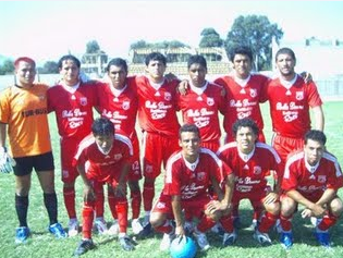 Equipo que represento al CSD Defensor Zarumilla en el 2009.